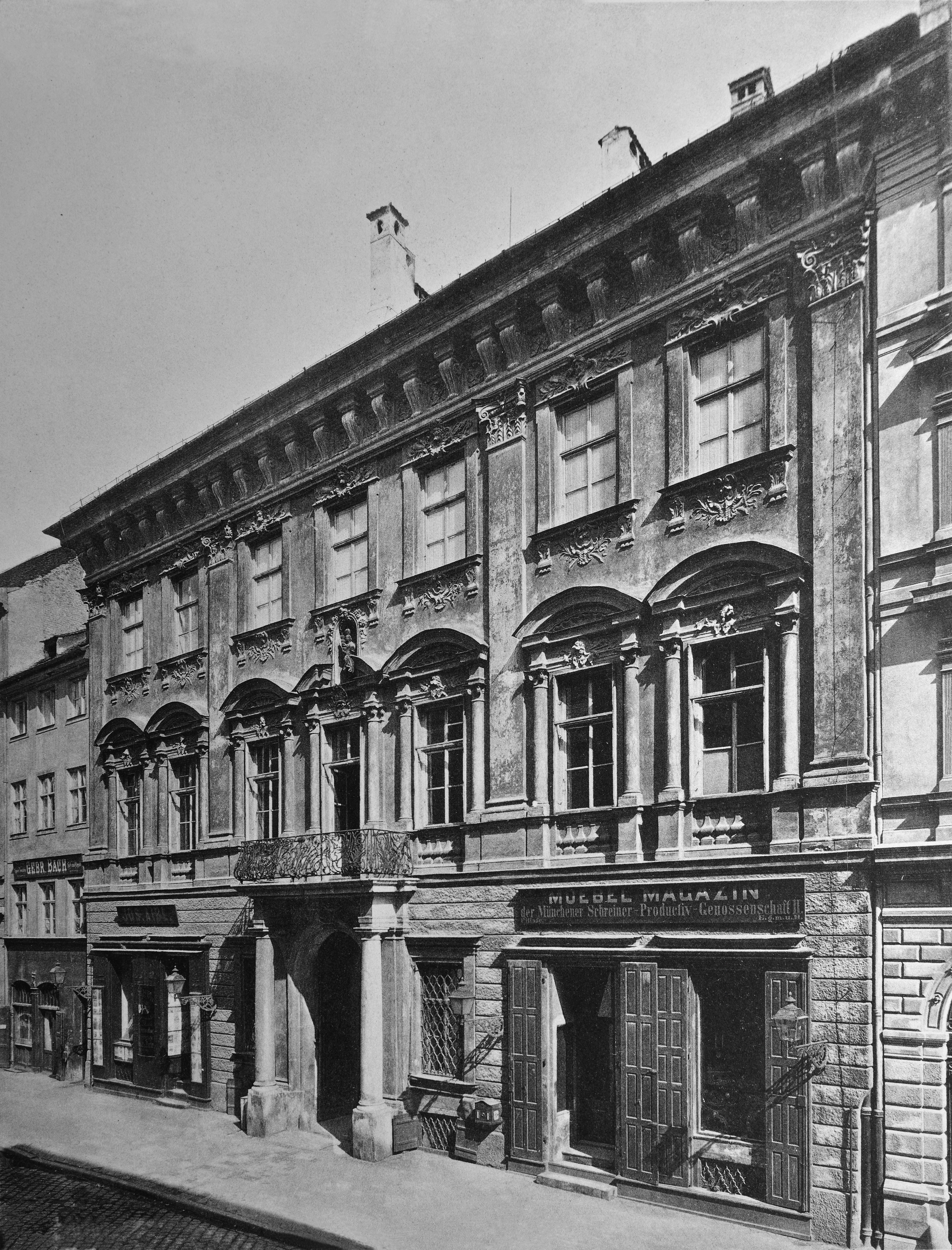 München. Fassadenansicht Kardinal-Faulhaber-Straße, bis ins Jahr 1956 die Promenadestraße 10. Auf der Fotoansicht sind noch die Ladeneinbauten zu erkennen. Der Eingangsbereich mit Laden, zur rechten Seite, wird in den Jahren ab 1911 wieder verschlossen werden. In der Rekonstruktion des Gebäudes nach 1950 wird das Aussehen der Fassade weitgehend wieder in den Zustand von vor 1815 gebracht.